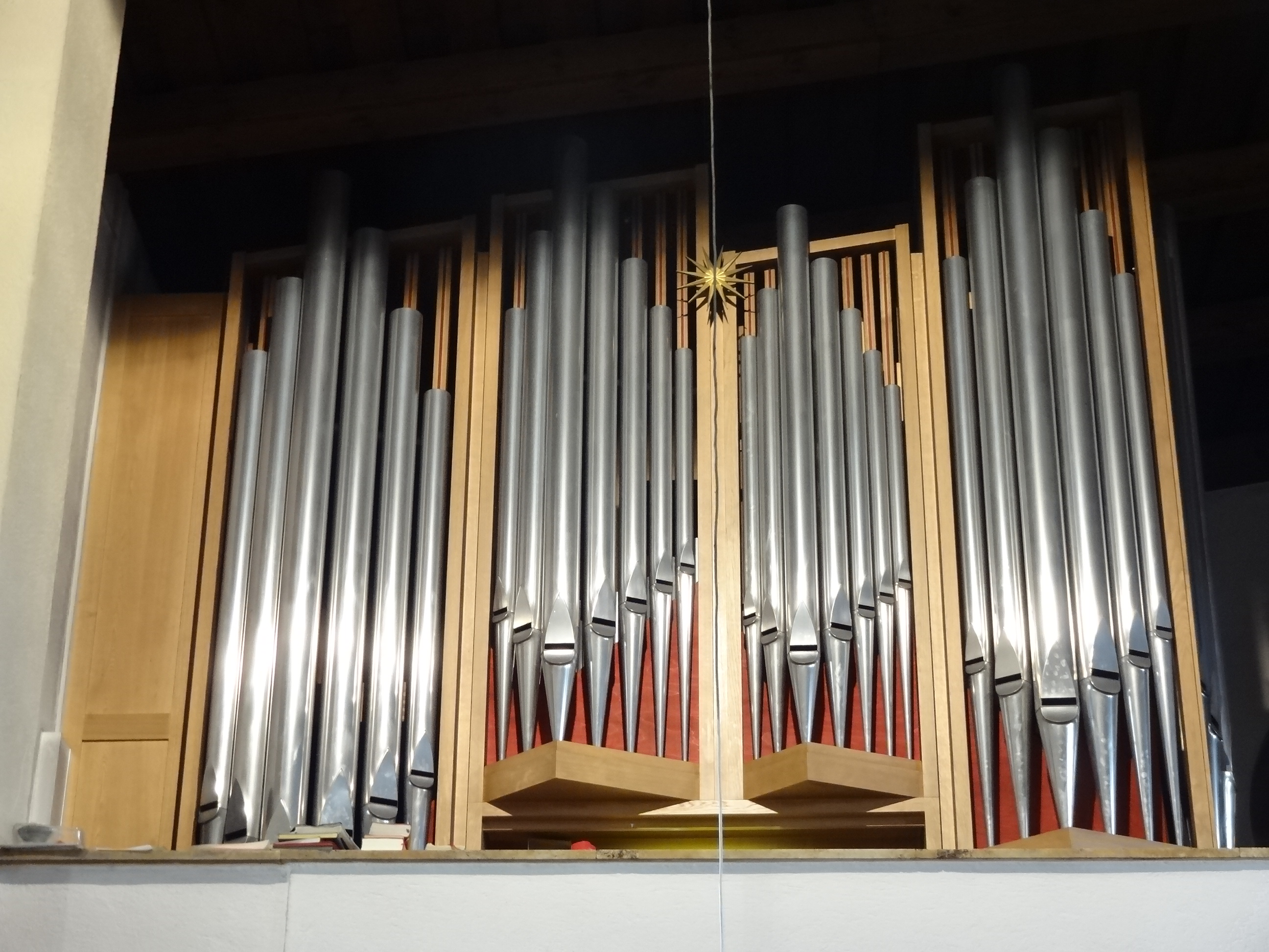 St. Gottfried (Butzbach)